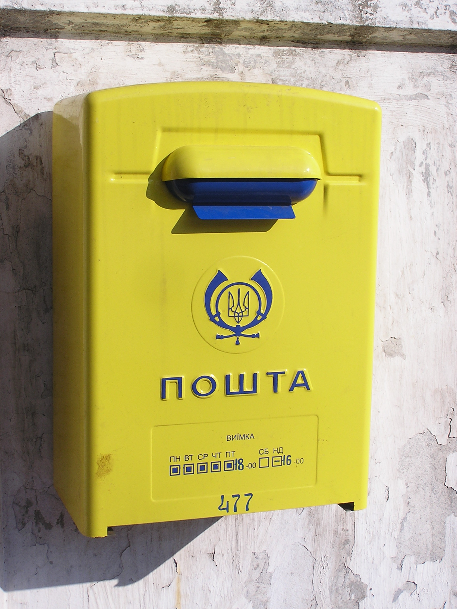 Донецк. Почтовый ящик.